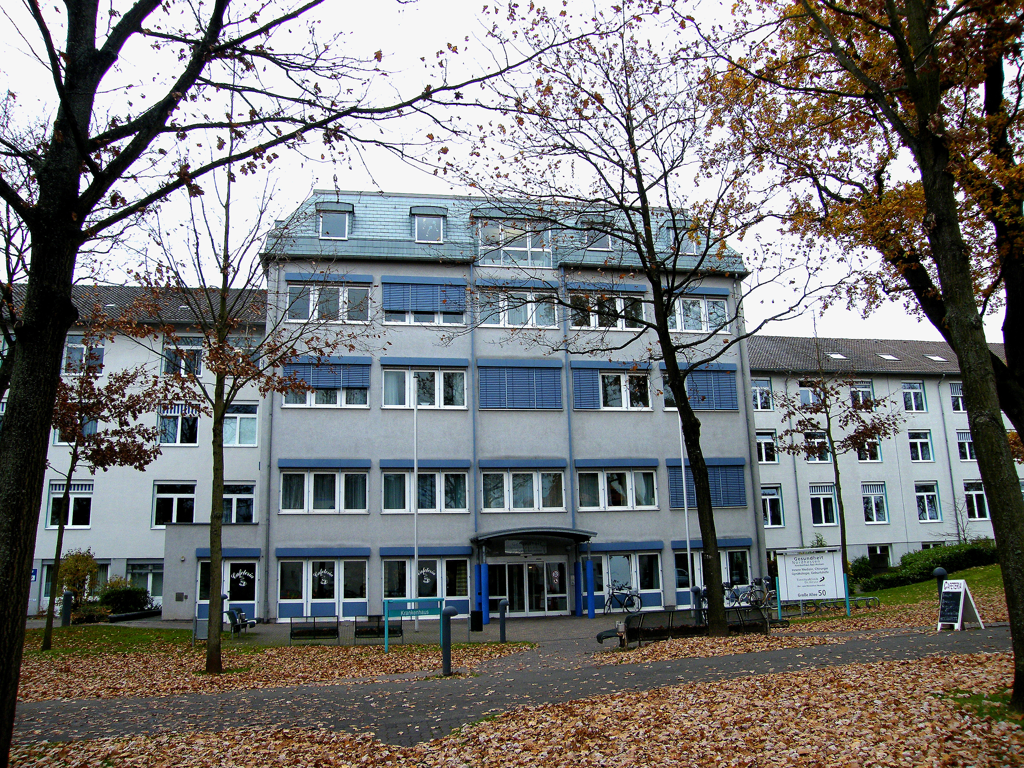 Stadtkrankenhaus Bad Arolsen, Große Allee 50 - Gesundheit Nordhessen Holding Haupteingang